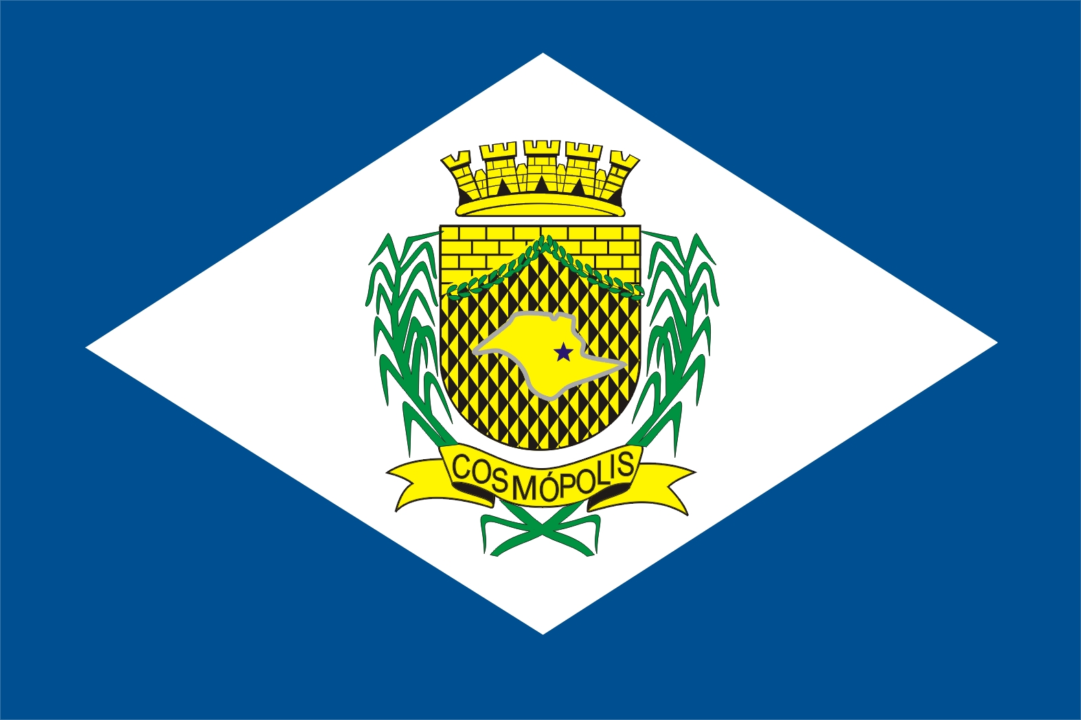 Bandeira do Município de Cosmópolis, São Paulo, Brasil